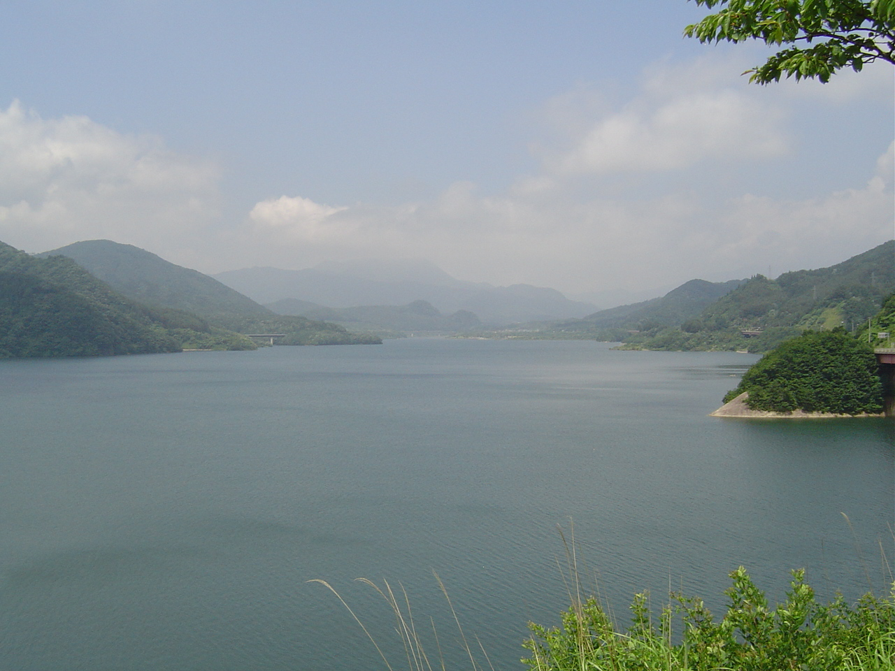 宮城県刈田郡七ヶ宿町七ヶ宿湖。